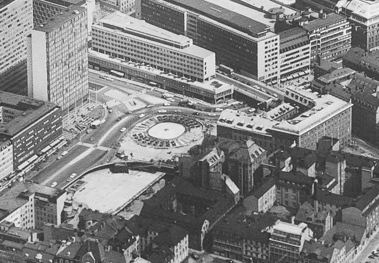 Stockholm, Nedra Norrmalm i samband med rivningar för Klaratunneln maj 1967